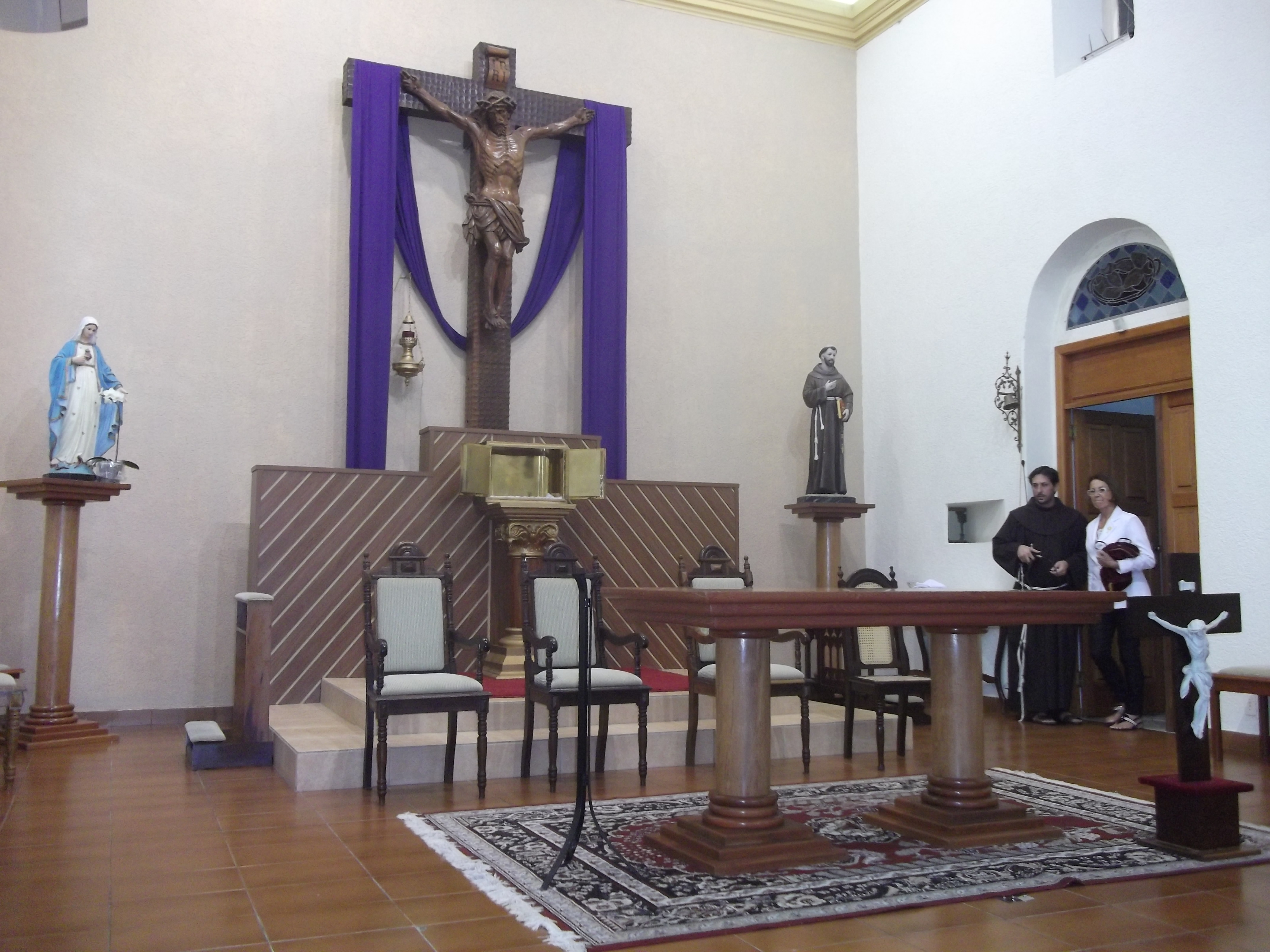 Igreja Santo Antônio, Florianópolis, Brasil